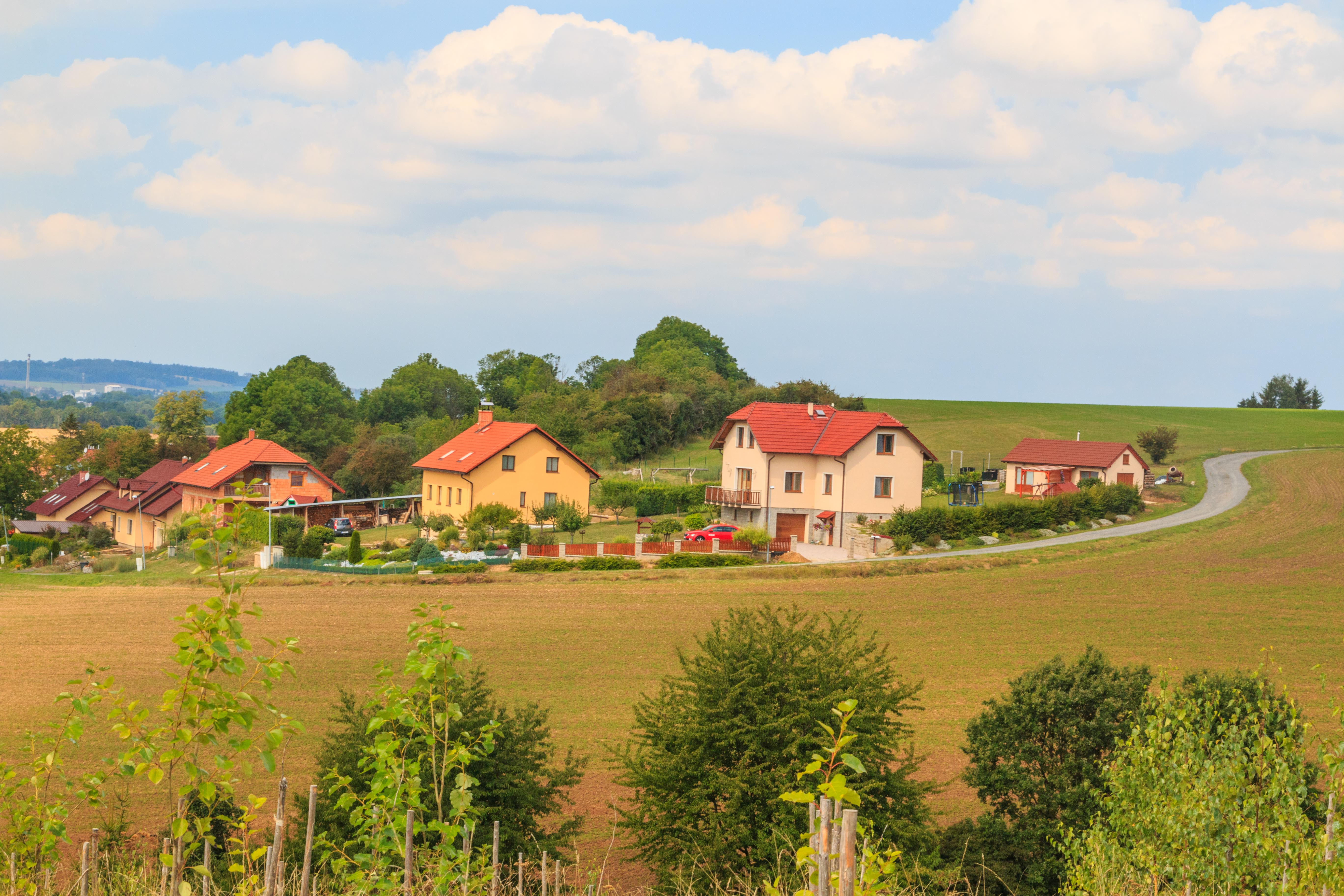 Pohled na Pekárku u Tisové z polní cesty nad vesnicí